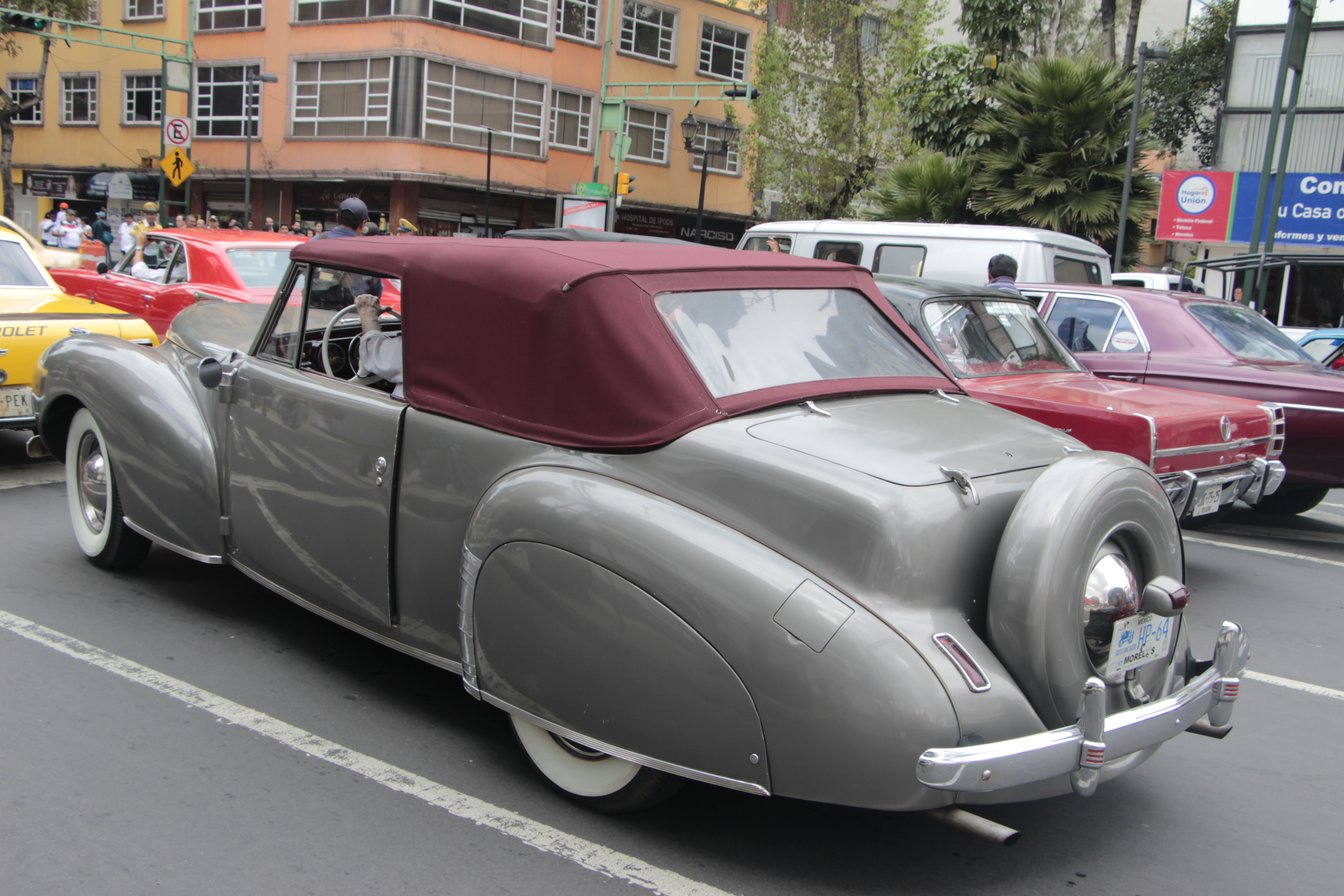 Desfile de autos clásicos que se llevo a cabo en la Ciudad de México, el 5 de octubre en Reforma y que rompió el Record Guinness.